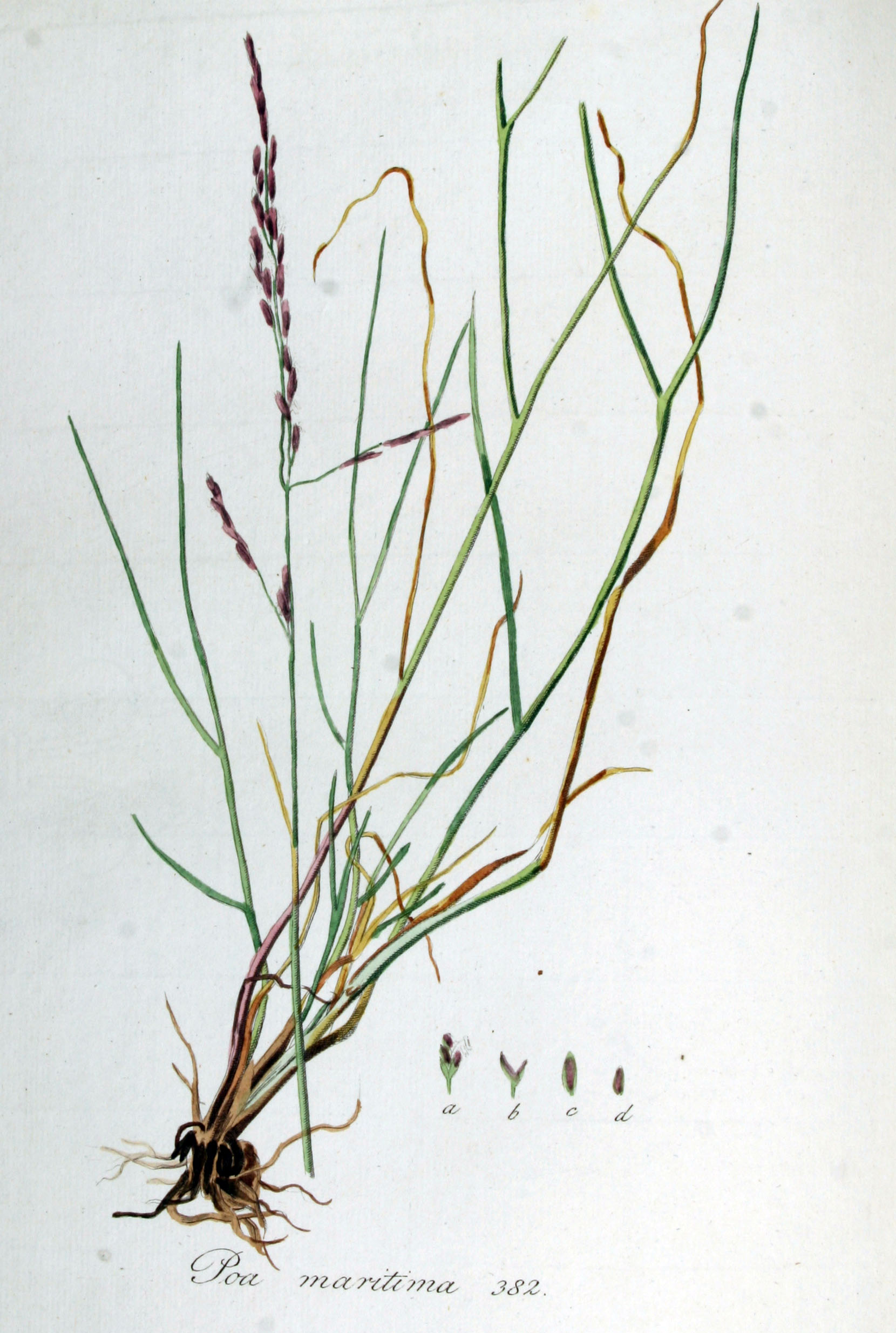 Puccinellia maritima (Huds.) Parl. (Syn. Poa maritima Huds.)